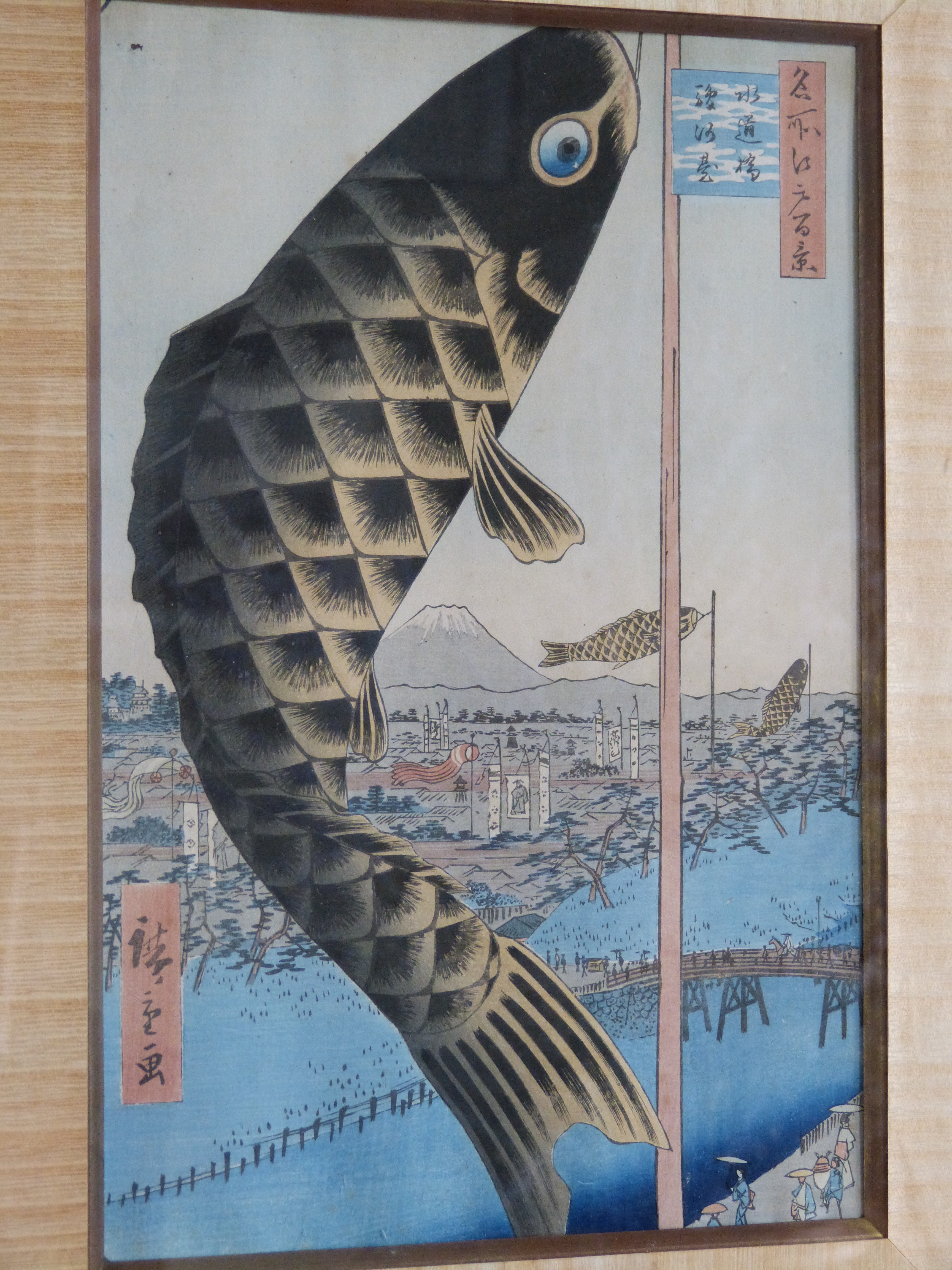 Représentation de la fête des garçons au Japon